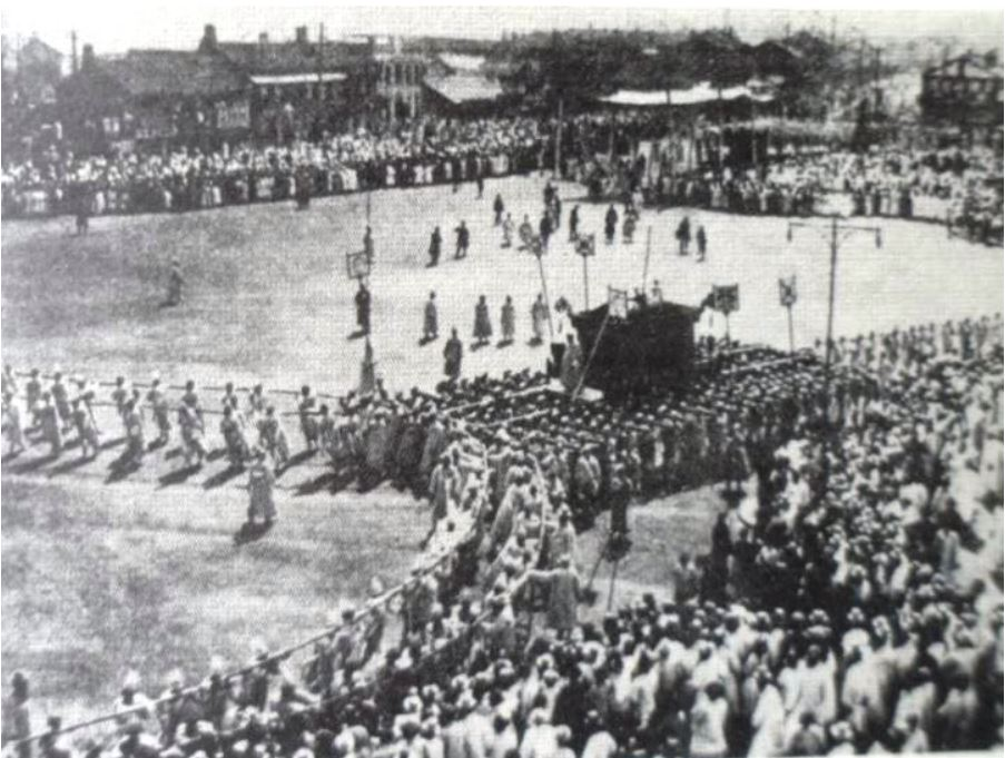 中文（中国大陆）: 朝鲜高宗国葬